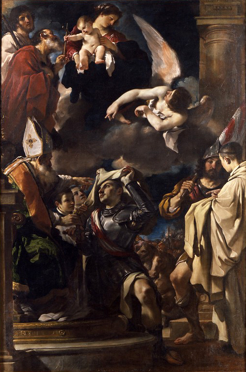 La vestizione